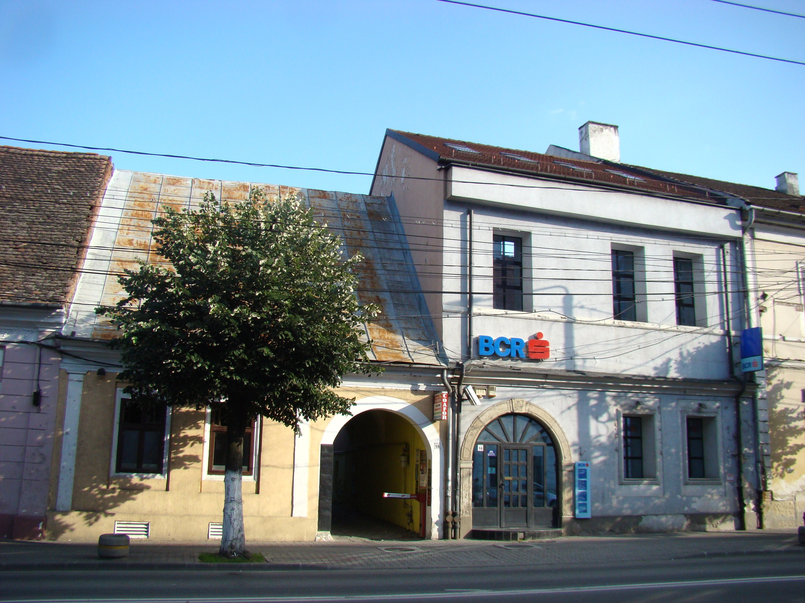 Casa parohială a bisericii unitariene